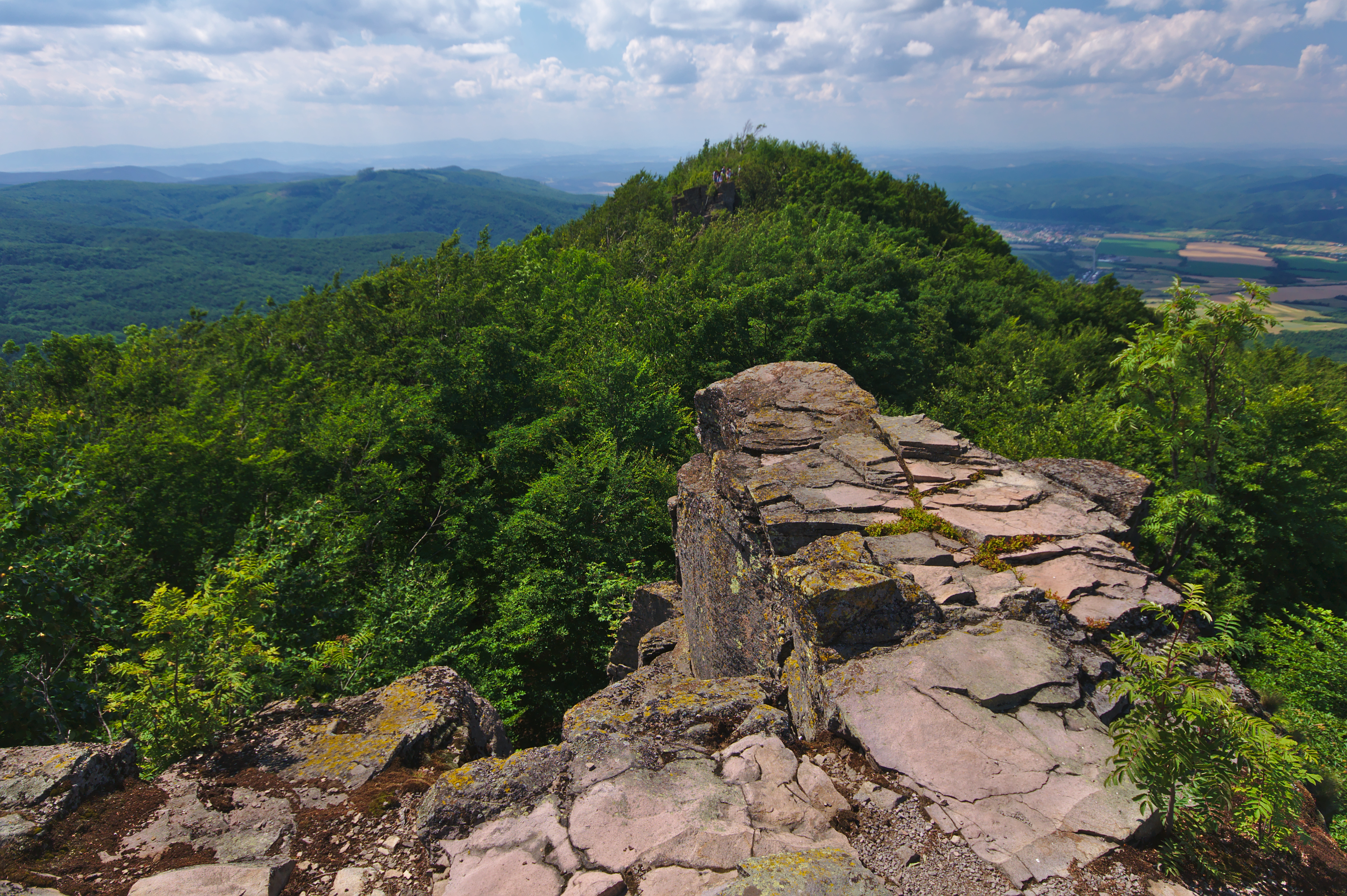 Prírodná pamiatka Sninský kameň - pohľad z Malého na Velký Sninský kameň, CHKO Vihorlat